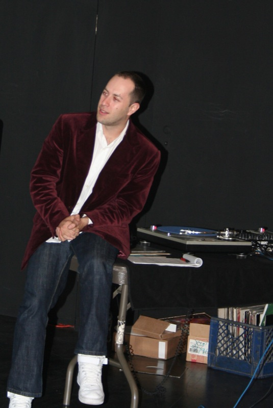 Adam Mansbach in 2007.